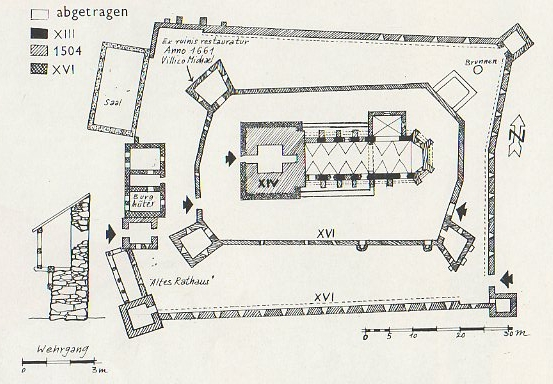 Planul fortificatiei din Archita.